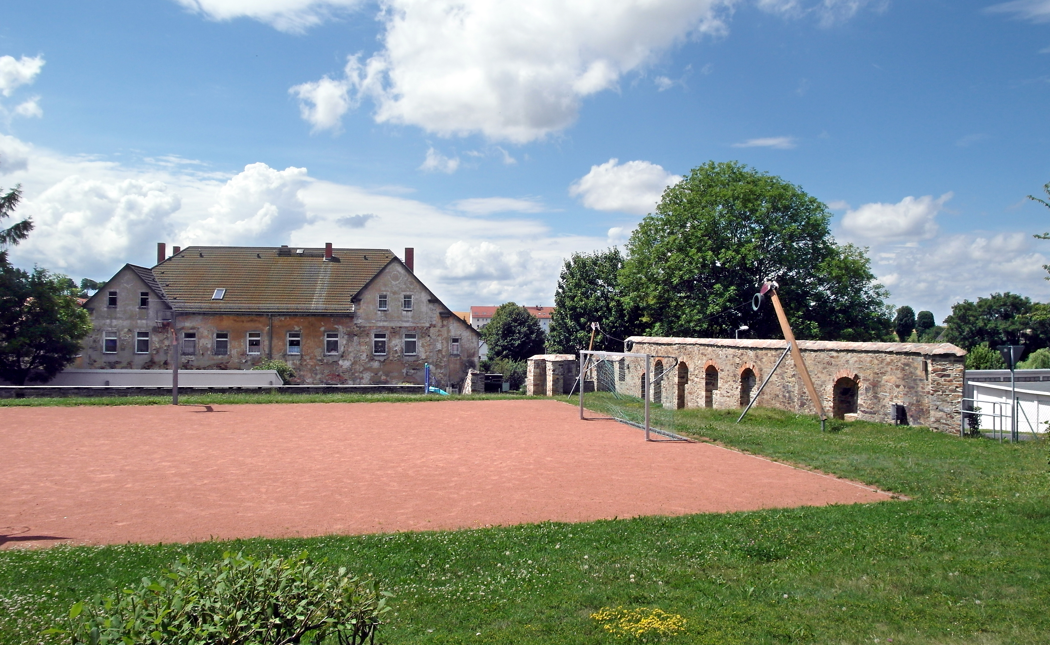 10.07.2017 01774 Pretzschendorf: Ehemaliges Rittergutsgelände Schulgasse (GMP: 50.874394,13.525955). Überreste 2004 abgerissen. Heute Spielplatz. Sicht von Norden. [SAM0872.JPG]20170710100DR.JPG(c)Blobelt